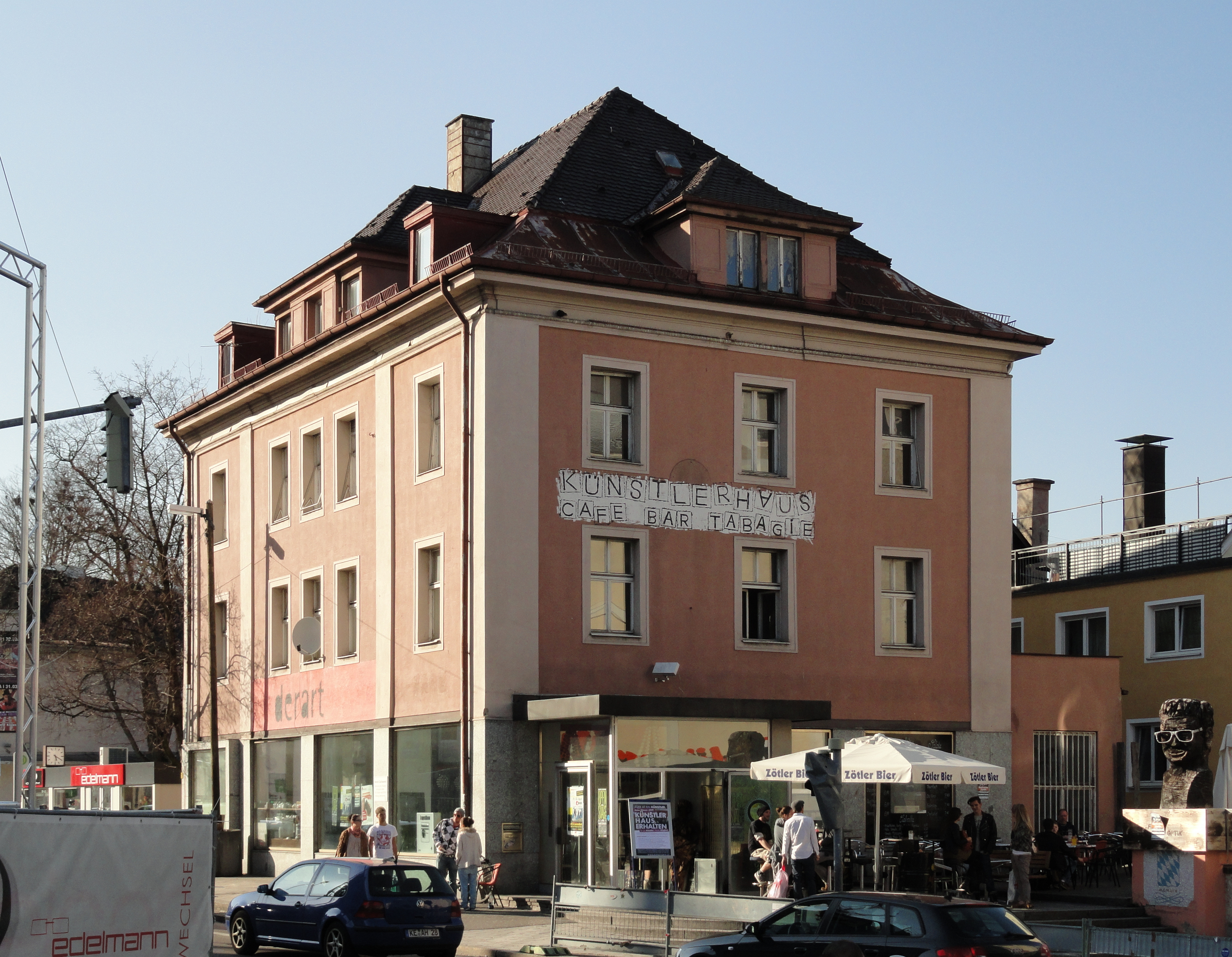 Künsterhaus in Kempten; Einwurfkasten - Bankschließfächer - Bayerisches Wappen